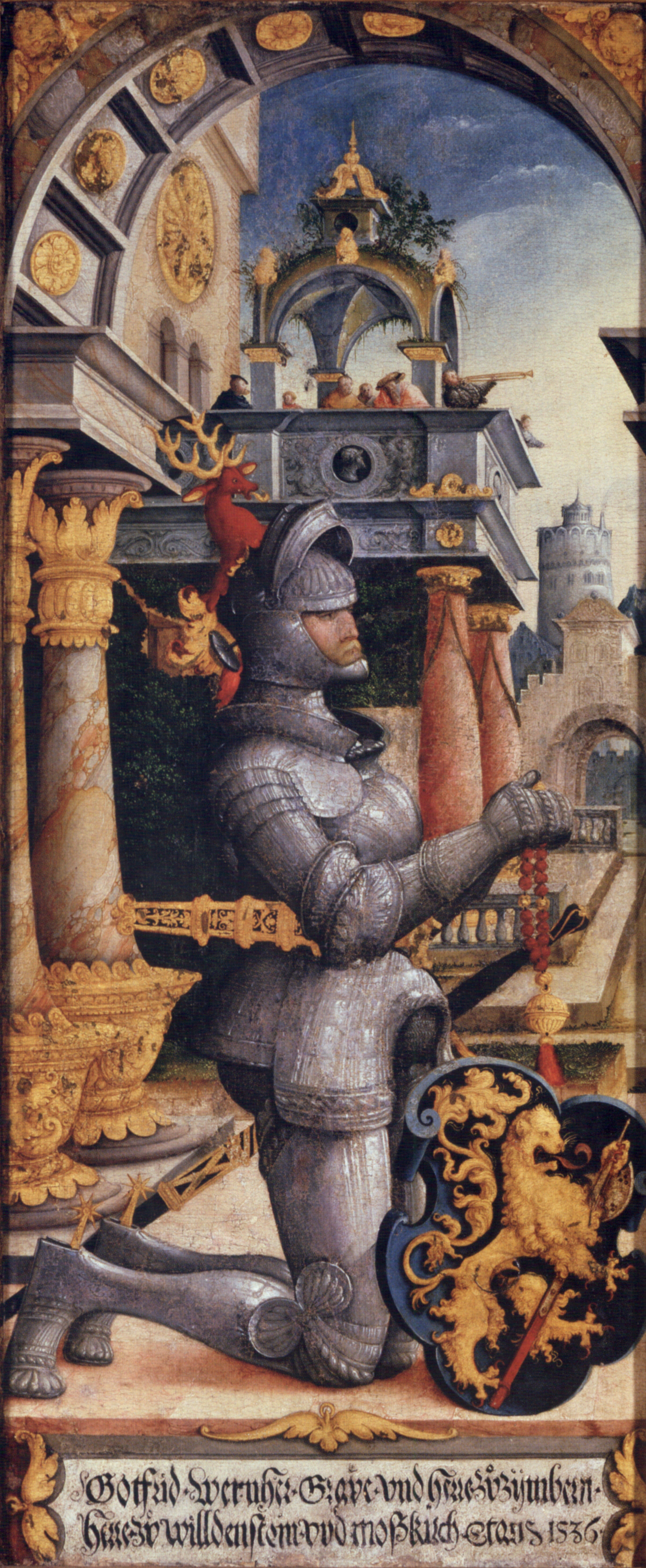 Wildensteiner Altar linker Drehflügel innen, kniender Stifter Graf Gottfried Werner von Zimmern mit Wappen. Gottfried Werner ist in Riefelharnisch dargestellt. Das Wappen ist noch freiherrlich ungeviert und ohne Helmzier, die Inschrift aber übermalt und Gottfried Werner als Graf bezeichnet. Die Erhebung in den Grafenstand erfolgte 1538. Staatsgalerie Stuttgart, Inv. L 1379 (früher Donaueschingen, Fürstenbergsammlungen, Inv.Nr. 76-80)